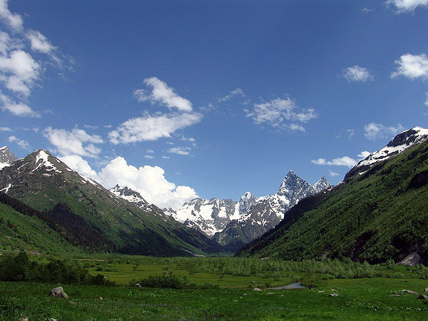 Тебердинское ущелье